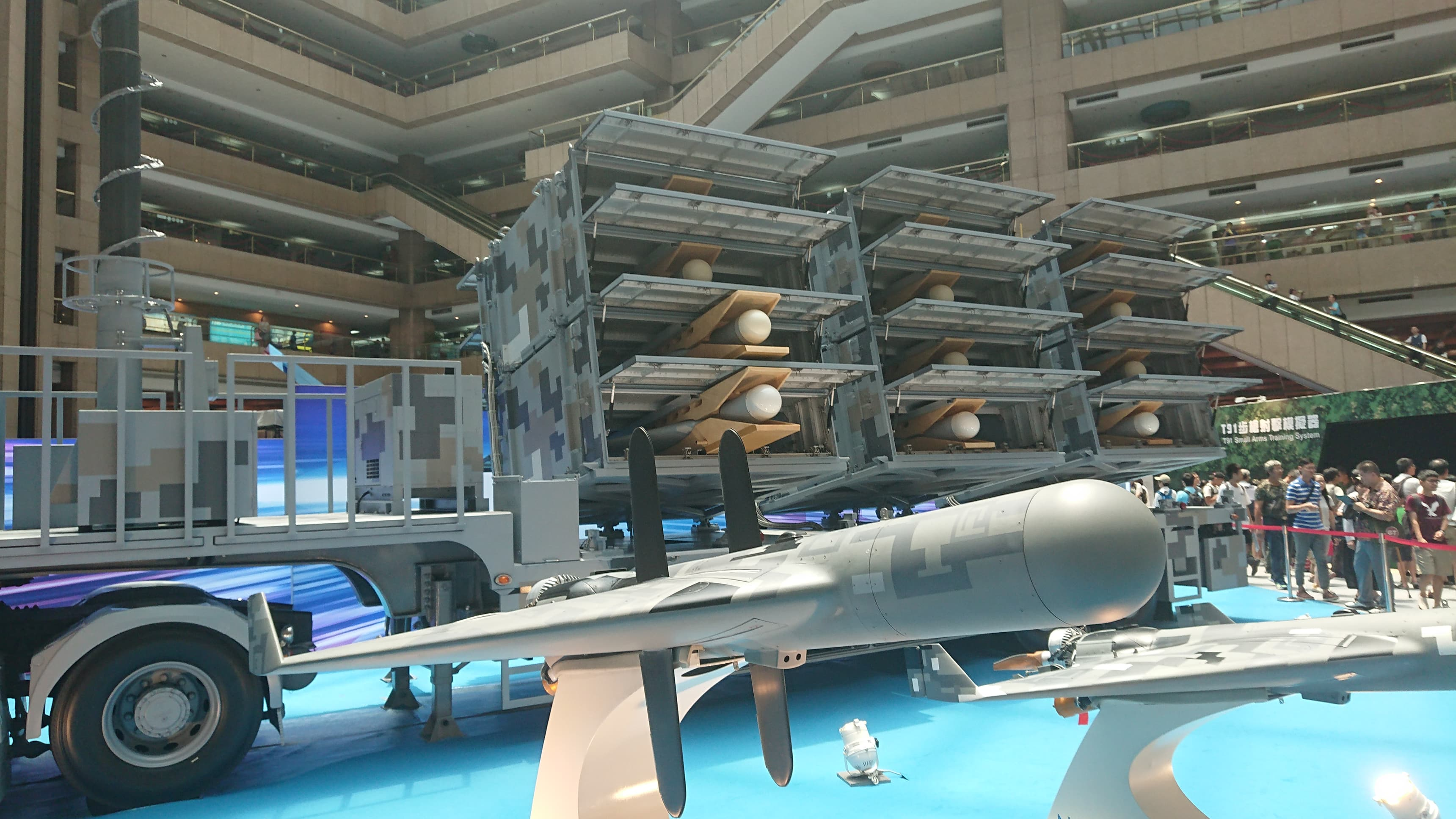 Launcher of Chien hsiang loitering munition